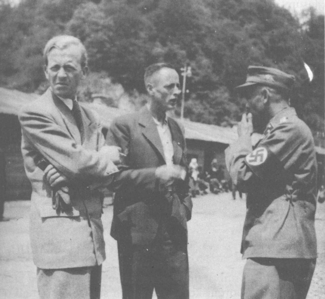 Günther Stier , Karl Ludwig Brandt in Emil Ordelt v taborišču Rajhenburg (barakepri železniški postaji)